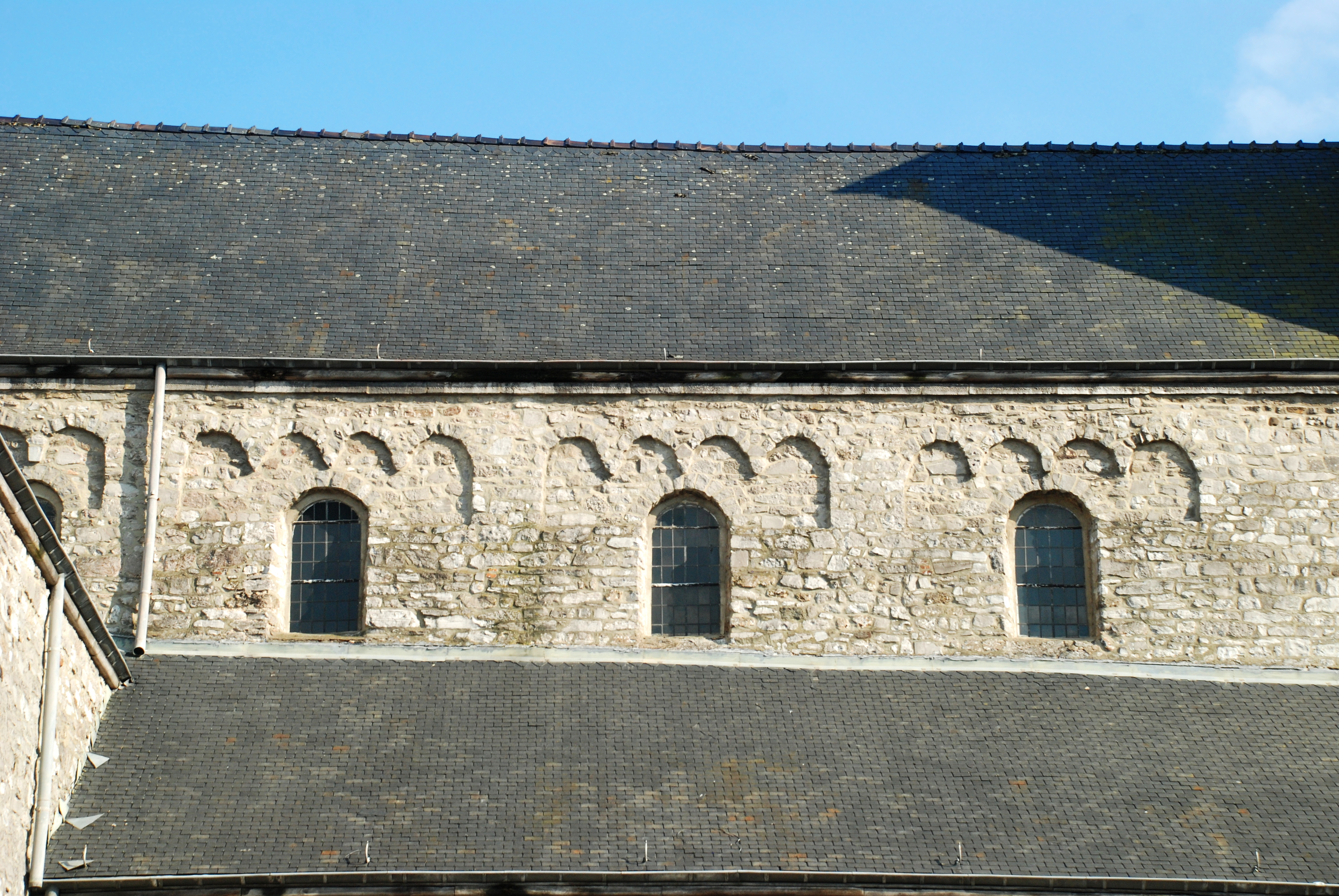 Belgique - Province de Namur - Église Saint-Maurice de Sclayn